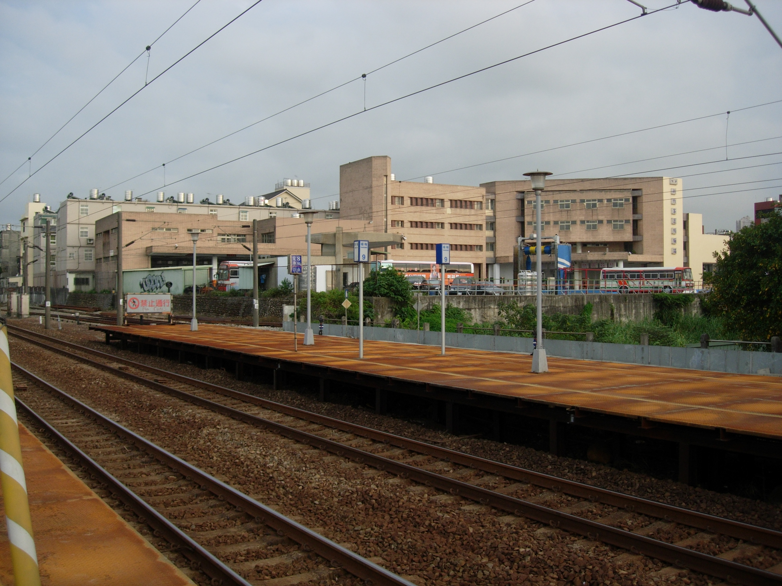 中文（台灣）: 從臺灣鐵路管理局楊梅車站遠望新竹客運楊梅站外觀。